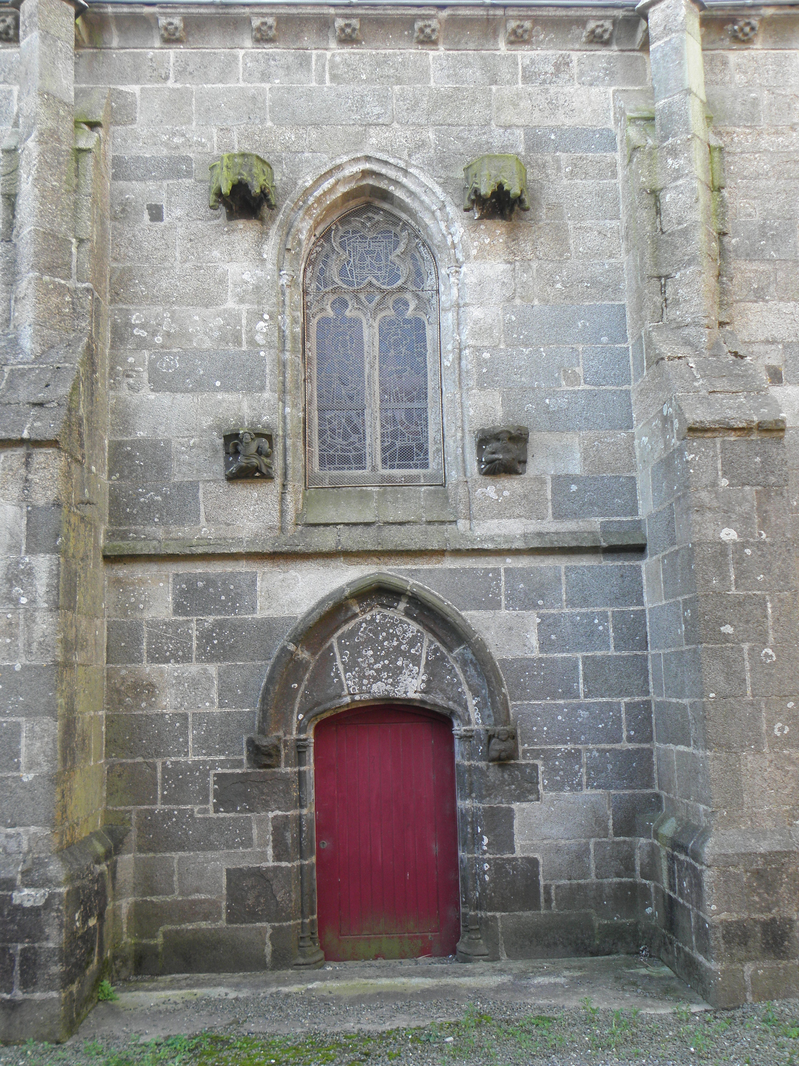 Portail septentrional de la basilique Notre-Dame du Folgoët (29).